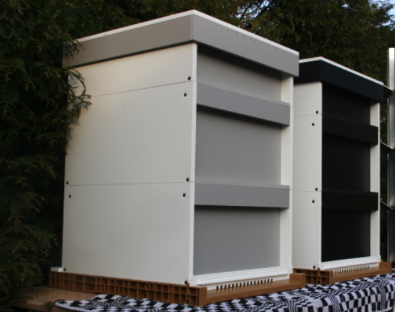 I-bee kast in grijze en zwarte variant. Lichtgewicht kunststof bijenkast. Deze kast is ontworpen door De Valksche Bijenhof, die hem ook produceert en verkoopt